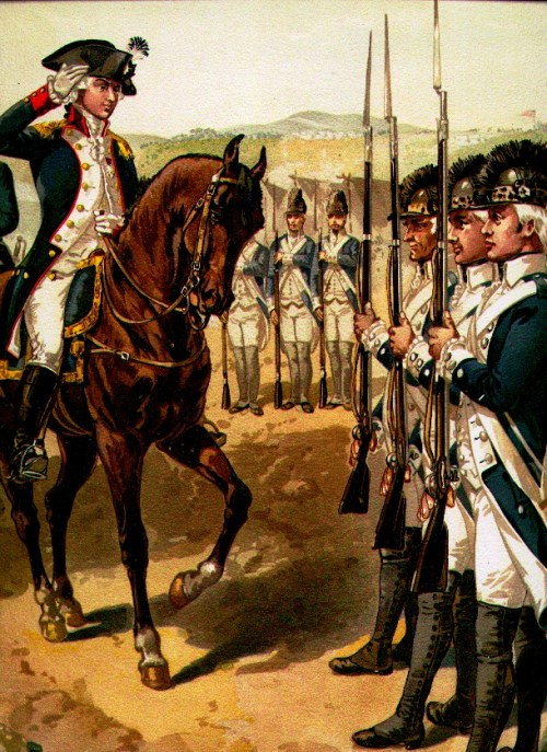 Leichte Infanterie der Kontinentalarmee, 1782